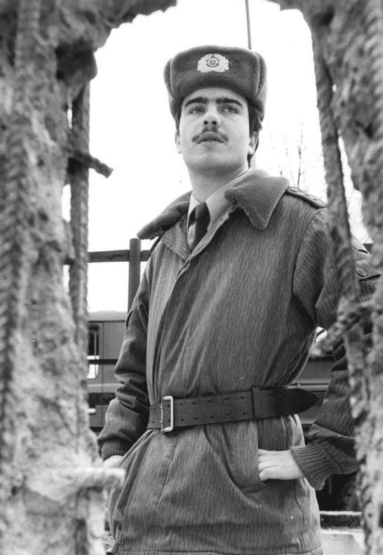 ADN-ZB-Hirschberger-17.1.90- Berlin: Bei einem Blick durch die Mauer läßt sich manches entdecken, auch wenn es "nur" ein Grenzsoldat ist."